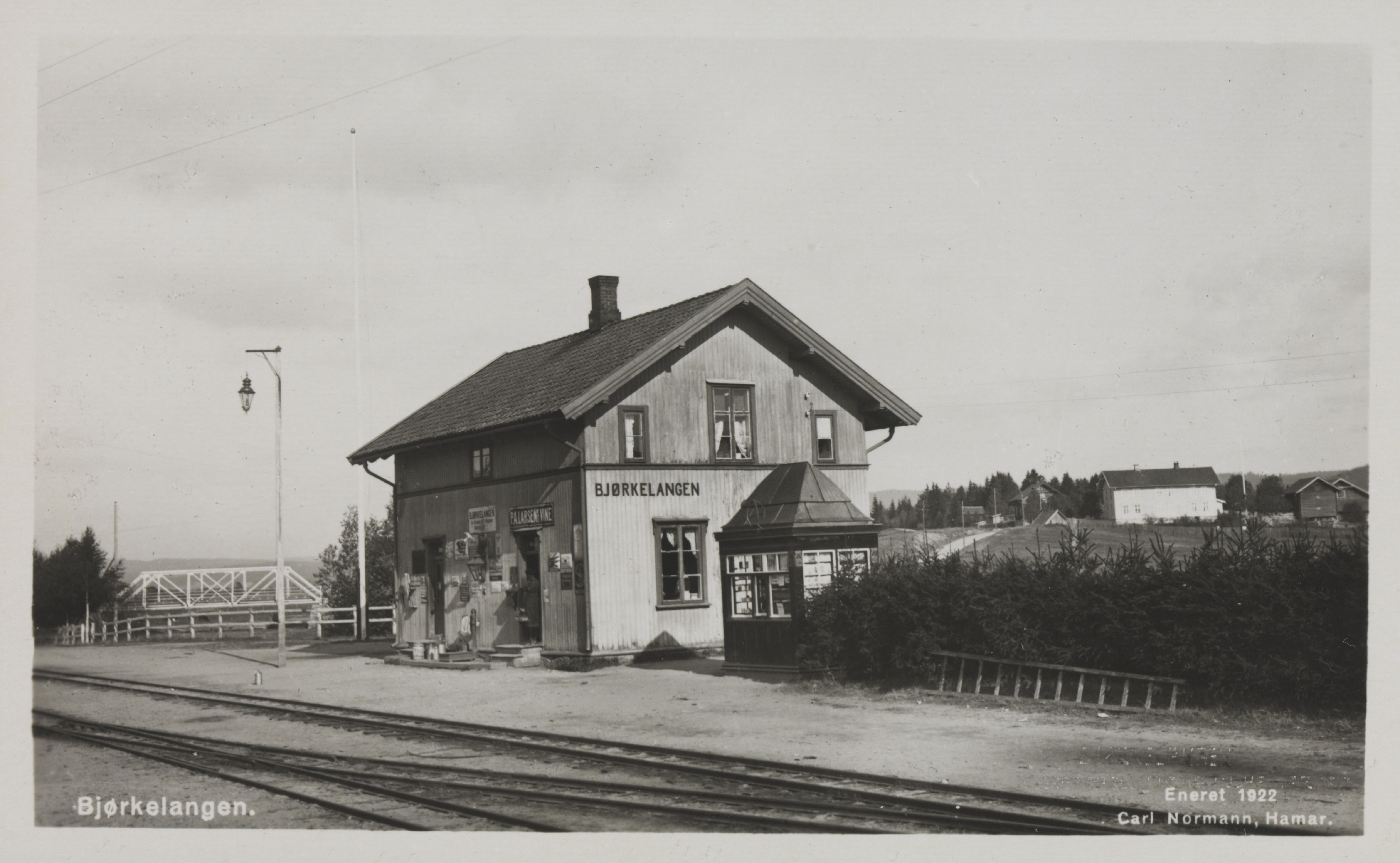 Bildet er hentet fra Nasjonalbibliotekets bildesamling Bjørkelangen,Bjørkelangen stasjon, Aurskog-Høland, Akershus